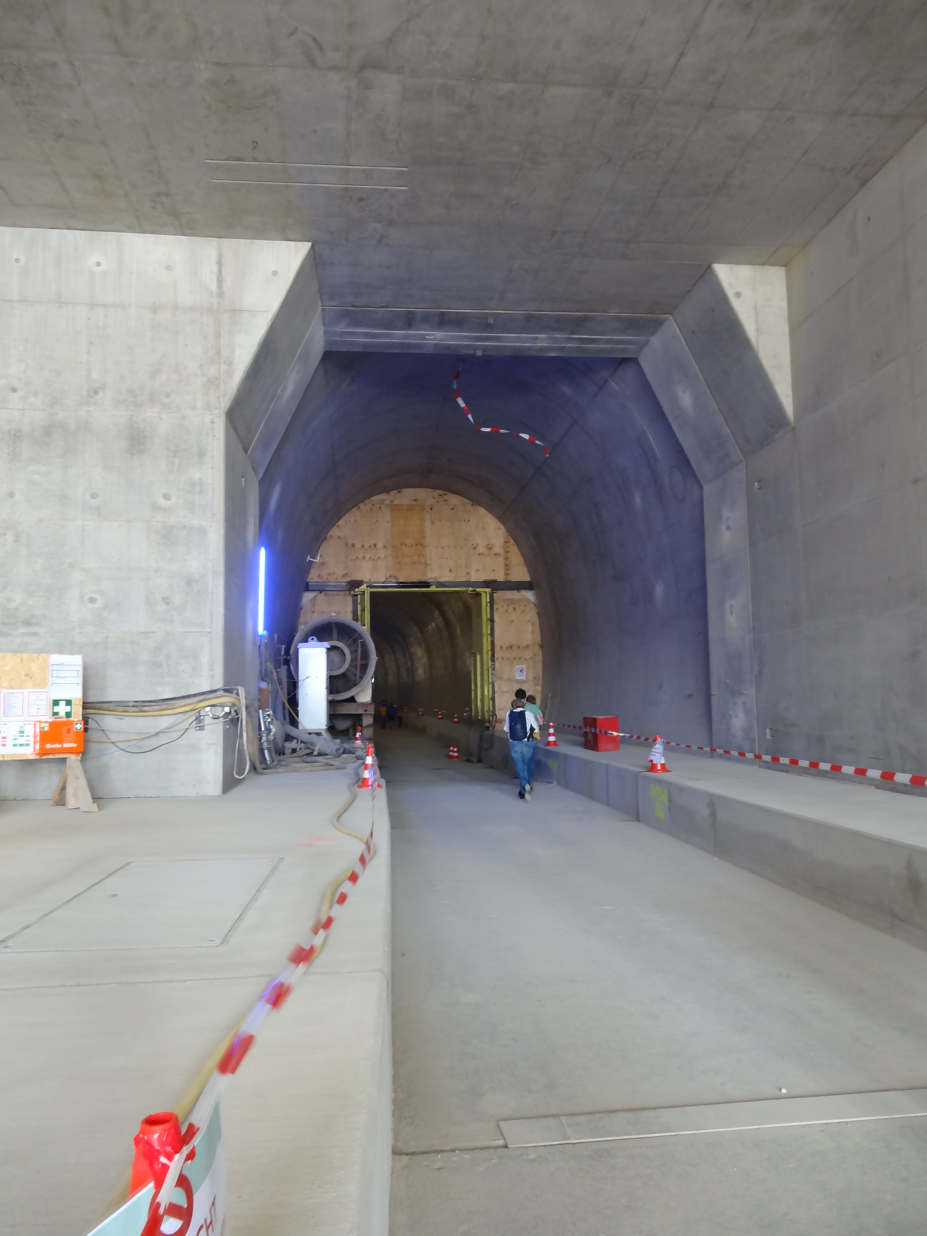 Albabstiegstunnel Portal Ulm am Tag der offenen Baustelle 2019